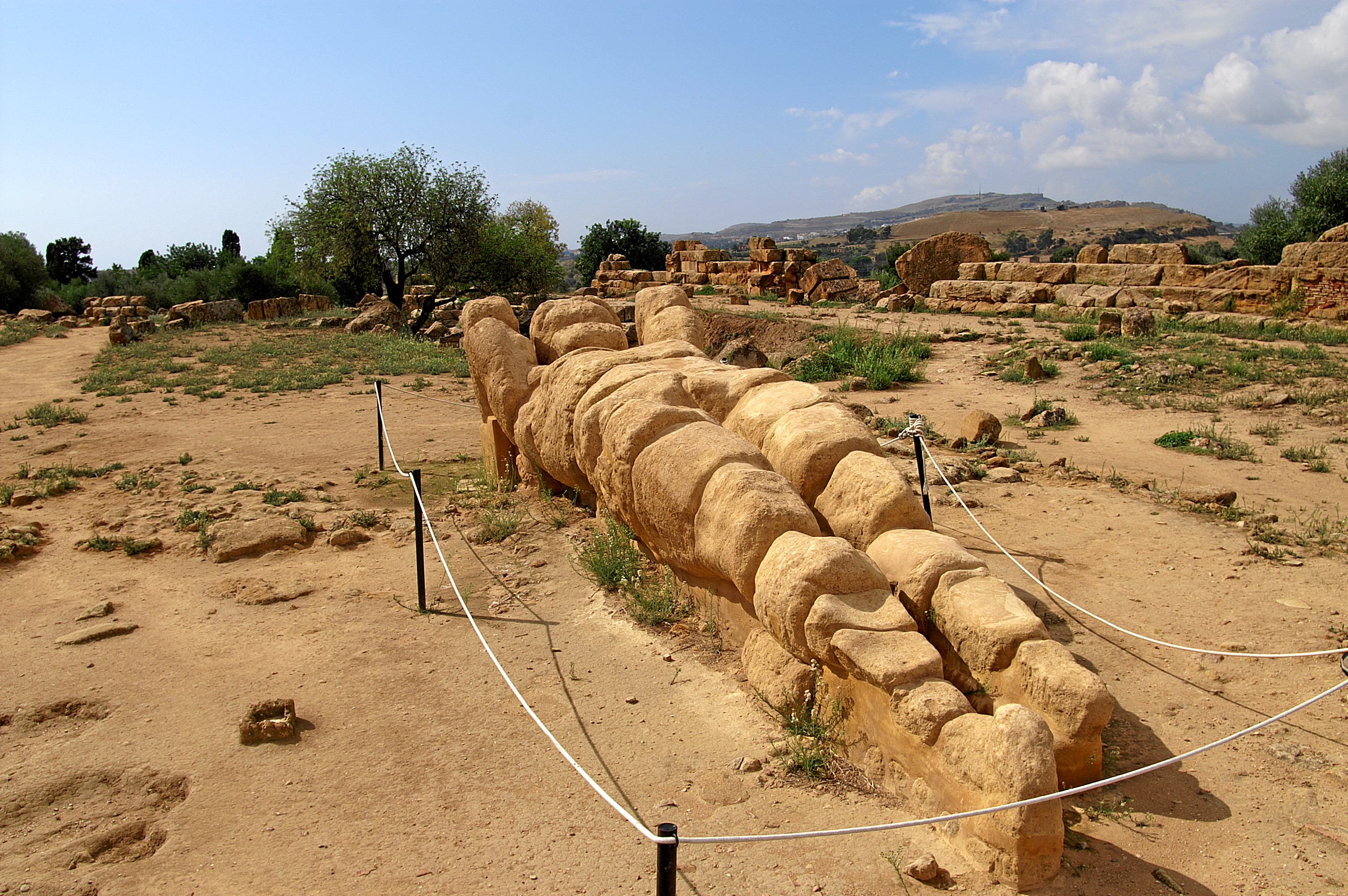 Vallei dei Templi: Telamon beim Zeus-Tempel